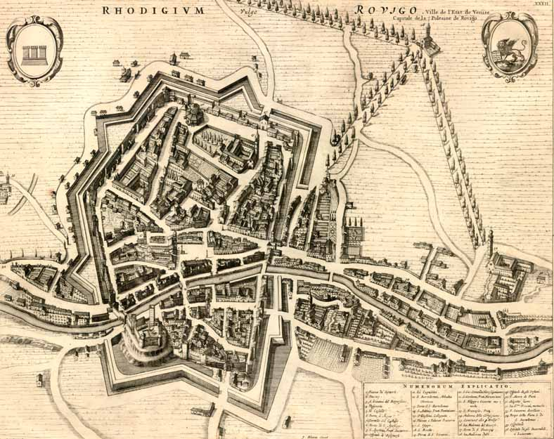 Pierre Mortier; antica mappa di Rovigo.